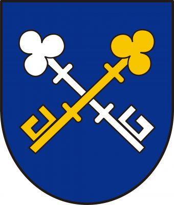 Znak obce Křoví na Moravě